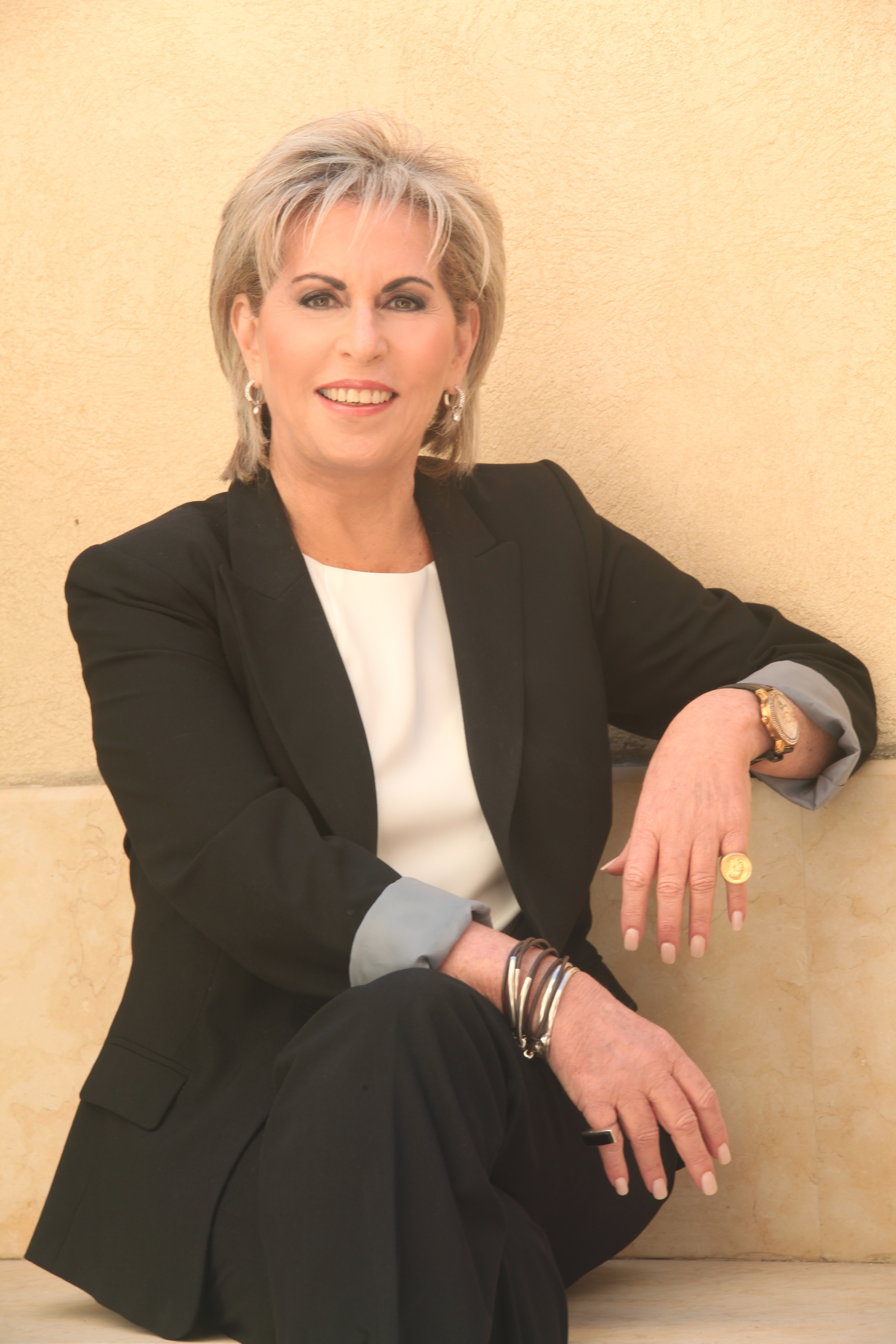 יו"ר שדולת הנשים בישראל, יו"ר "קרן מעגלים",דירקטורית בחברת החשמל וברשת "עמל", חברת עמותה בבלט הישראלי, בתיאטרון יידישפיל, בסוזן דלל, בית צבי וצוותא ויו"ר אגודת הידידים של תיאטרון יידישפיל.